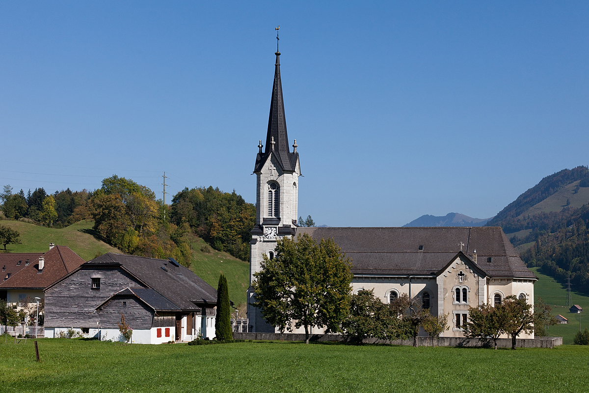 Eglise Saint-Grat à Montbovon (Haut-Intyamon) (FR)